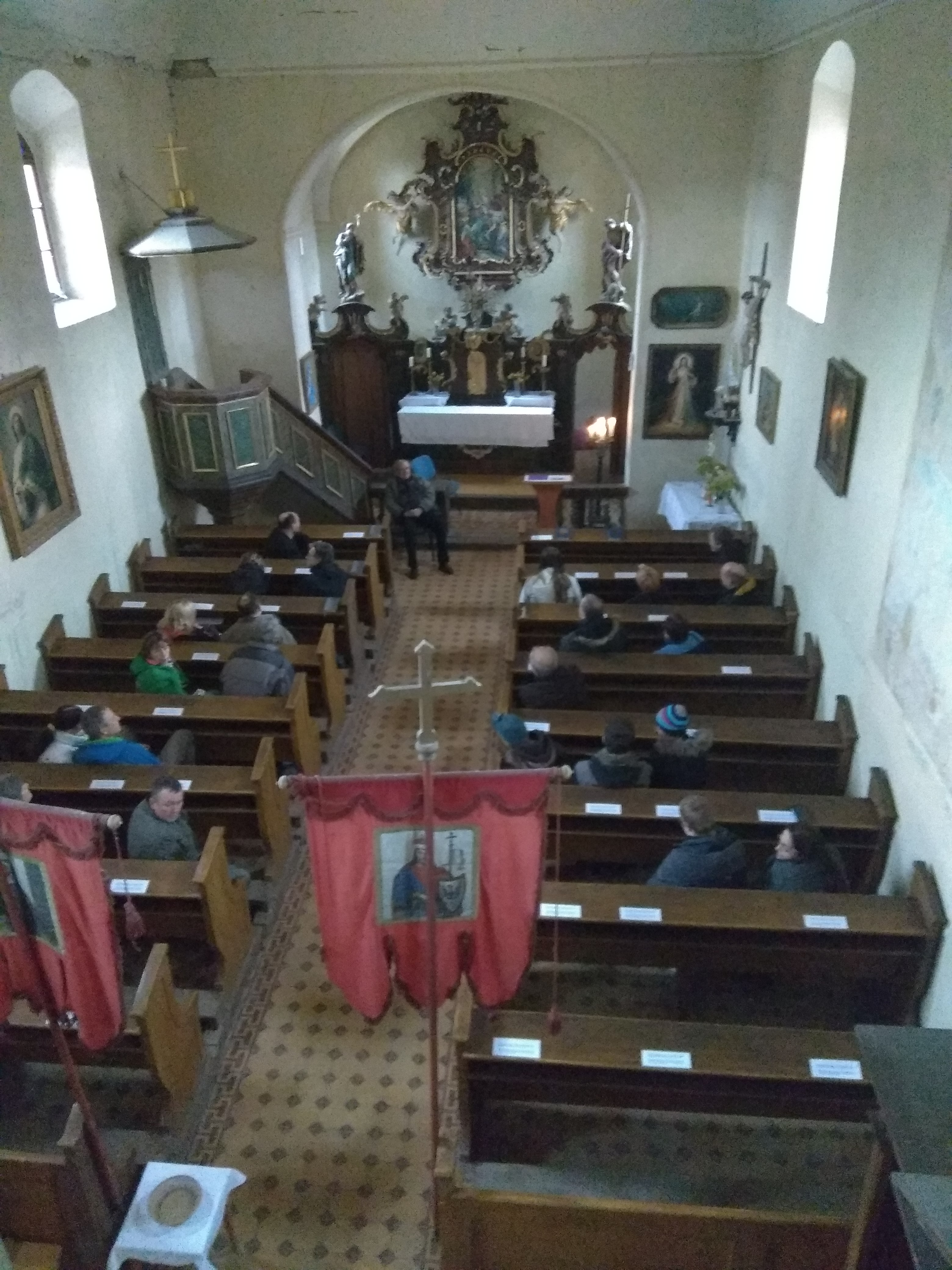 Olešky kostel - interiér